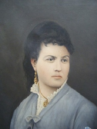 Ritratto della figlia Maria De Maulo